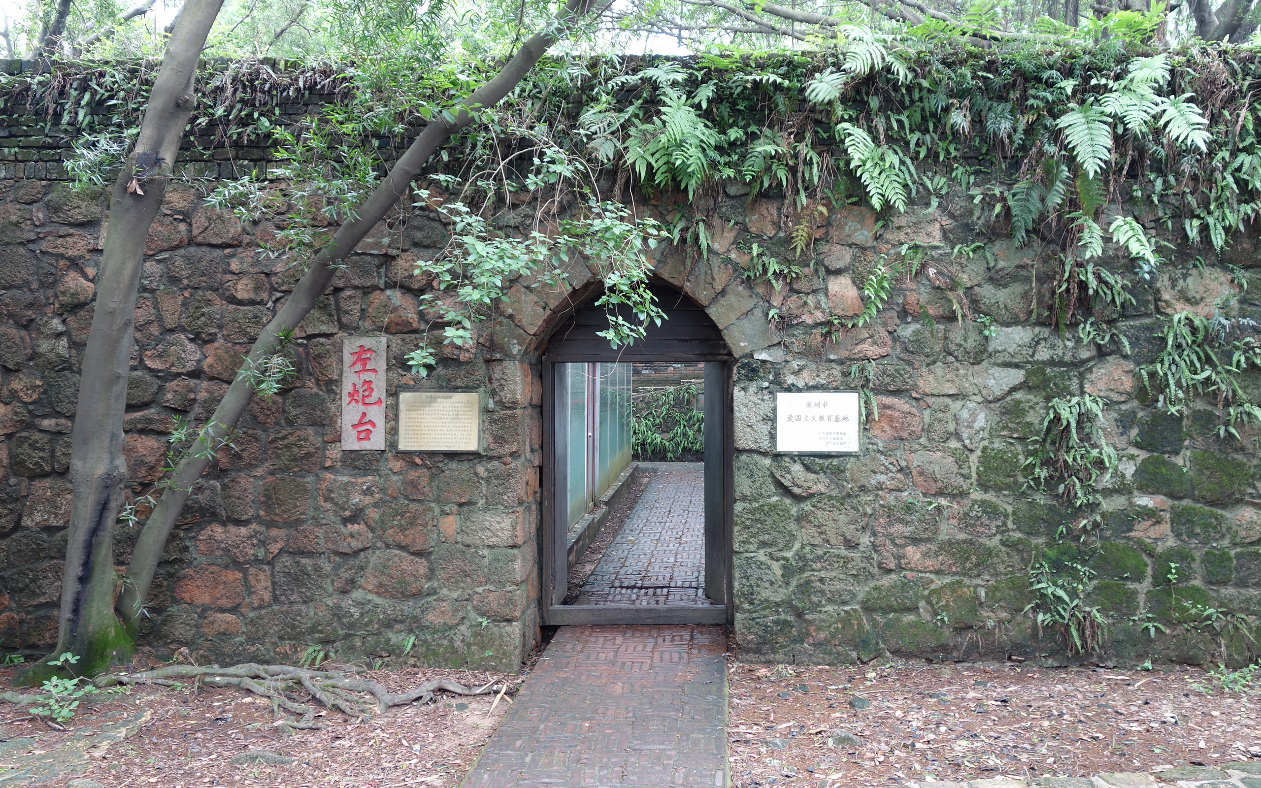 赤湾左炮台入口